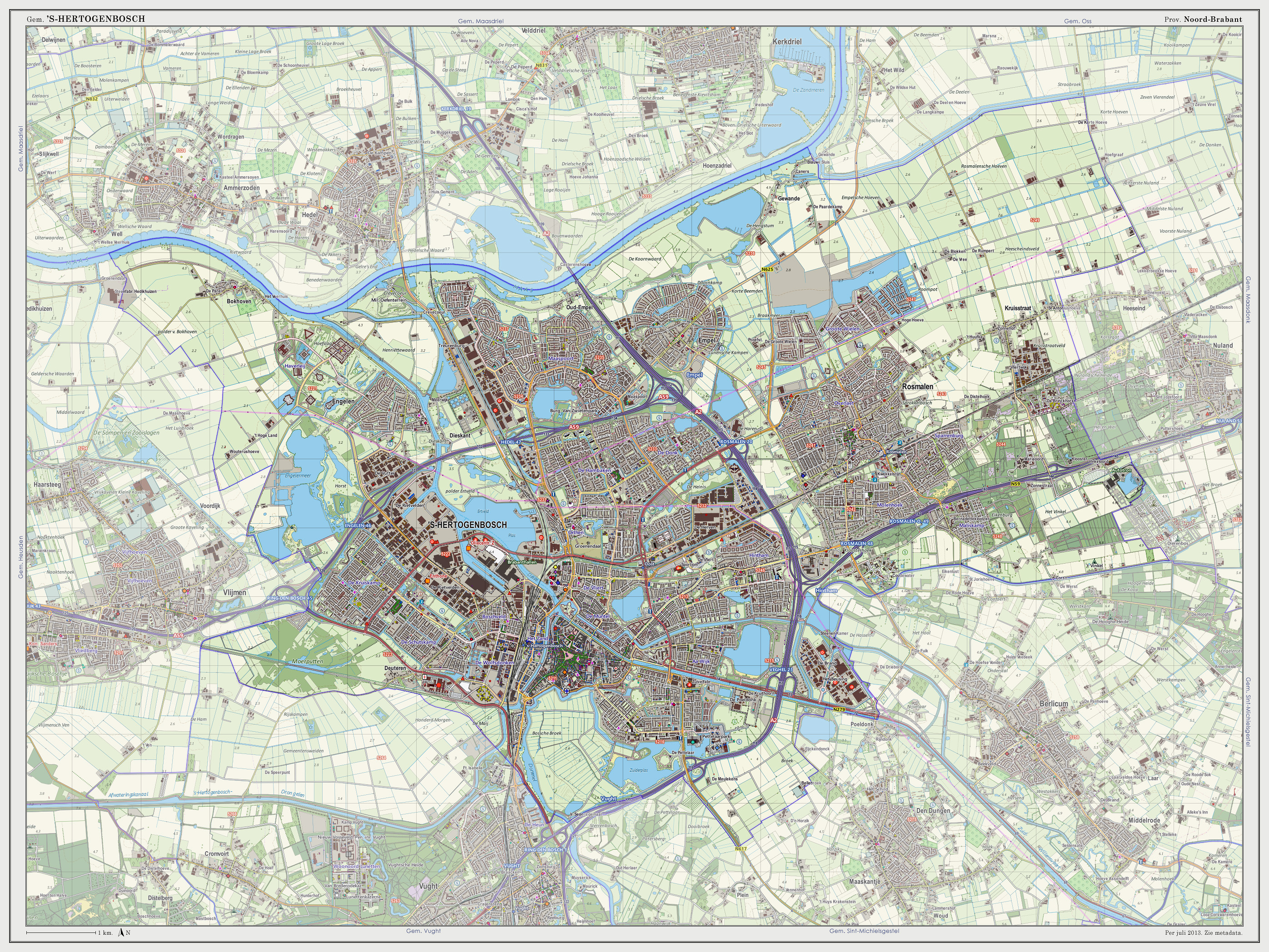 Topografische kaart van gemeente 's-Hertogenbosch (2013). Samengesteld door Jan-Willem van Aalst op basis van de GML open geodata van de BRT/Top10NL (basisregistratie Topografie, Kadaster 2011), vrijgegeven door Kadaster onder de Creative Commons BY licentie. Additionele gegevens uit BAG (8 juli 2013), uit de Open Street Map (9 juli 2013) en uit de Risicokaart. Peildatum kaartbeeld: 9 juli 2013. Zie ook Gemeentenatlas.nl Samenstelling en kleurenschema: Jan-Willem van Aalst, met QuantumGIS en Photoshop. Zie ook de Legenda.